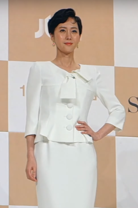 181122 JTBC 'SKY캐슬' 제작발표회